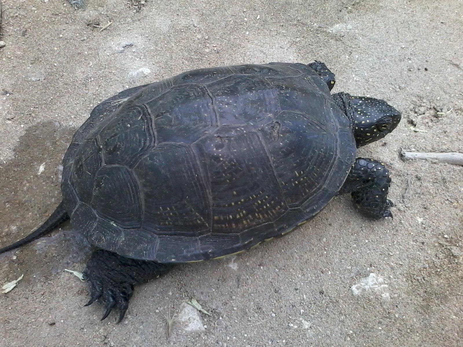 Черепаха біля Південного Бугу